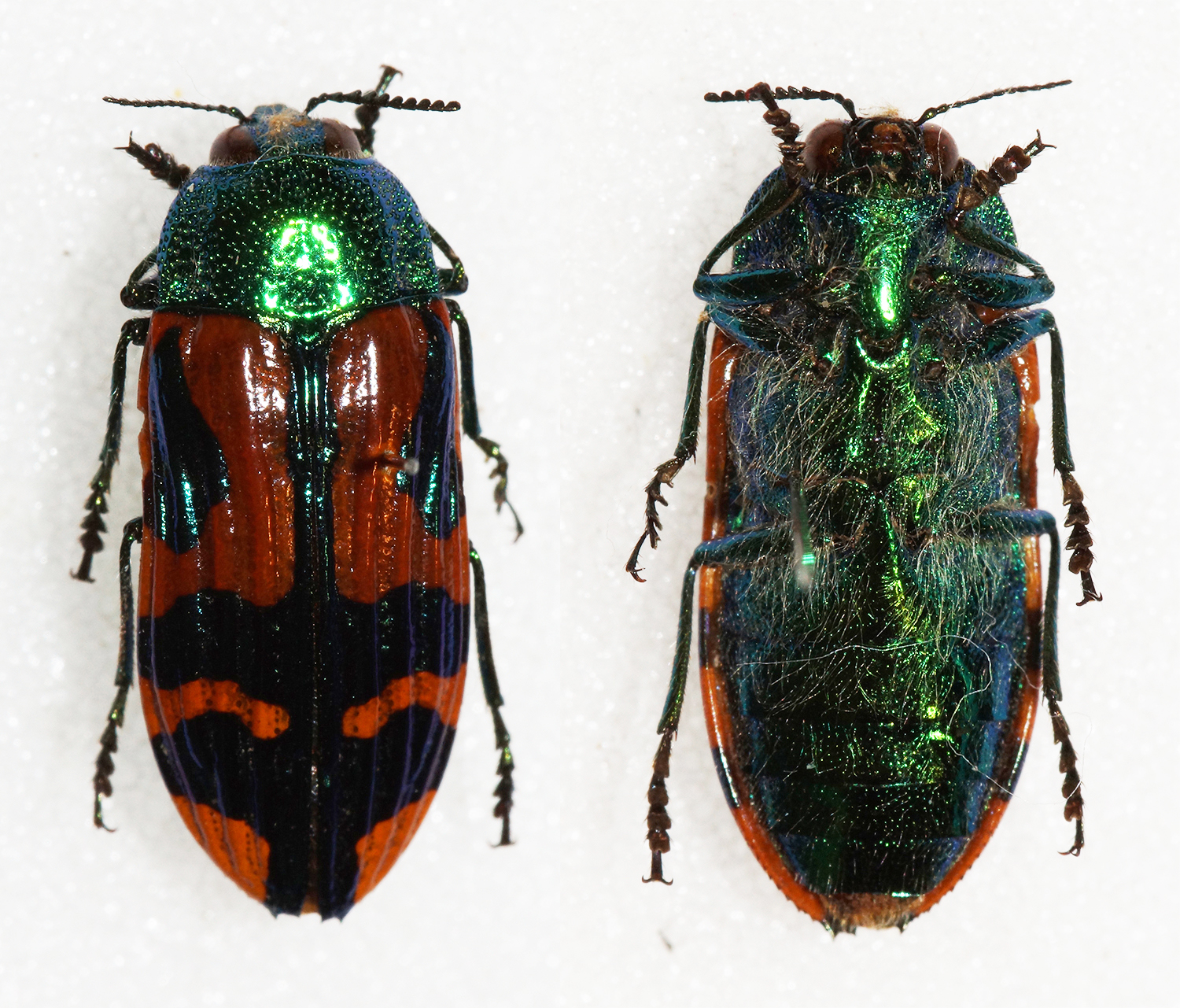 Germain,1855 Sex: ? Data: 02-09-13 - La Obra - Chile Size: 13.5mm